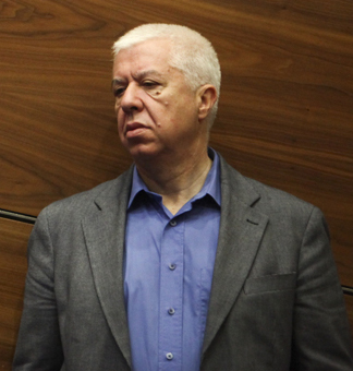 O ministro das Finanças e da Economia, Teixeira dos Santos, durante o Fórum Novas Fronteiras 2009-2013 - Economia, na FIL, 4 Julho 2009, em Lisboa.